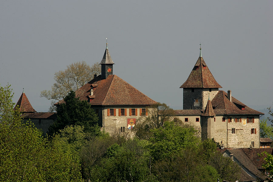 Schloss Kyburg in Kyburg